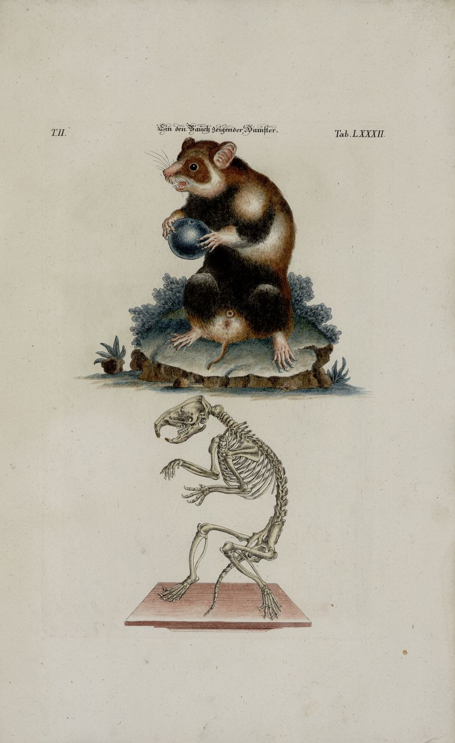 Angenehmer und nützlicher Zeit-Vertreib mit Betrachtung curioser Vorstellungen allerhand kriechender, fliegender und schwimmender, auf dem Land und im Wasser sich befindender und nährender Thiere, sowohl nach ihrer Gestalt und äusserlichen Beschaffenheit, als auch nach der accuratest davon verfertigten Structur ihrer Scelete oder Bein-Cörper, nebst einer deutlichen so physicalisch und anatomisch besonders aber osteologisch und mechanischen Beschreibung derselben / nach der Natur gezeichnet, gemahlet, in Kupfer gestochen und verlegt von Johann Daniel Meyer, Miniatur-Mahler in Nürnberg; Band 2; Nürnberg 1752 Tafel 82 Hamster